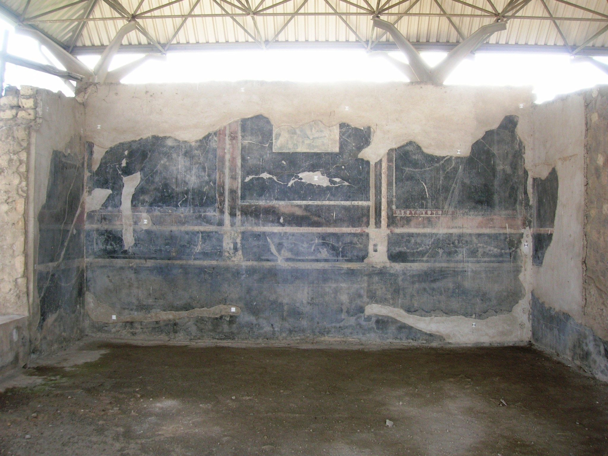 Stanza